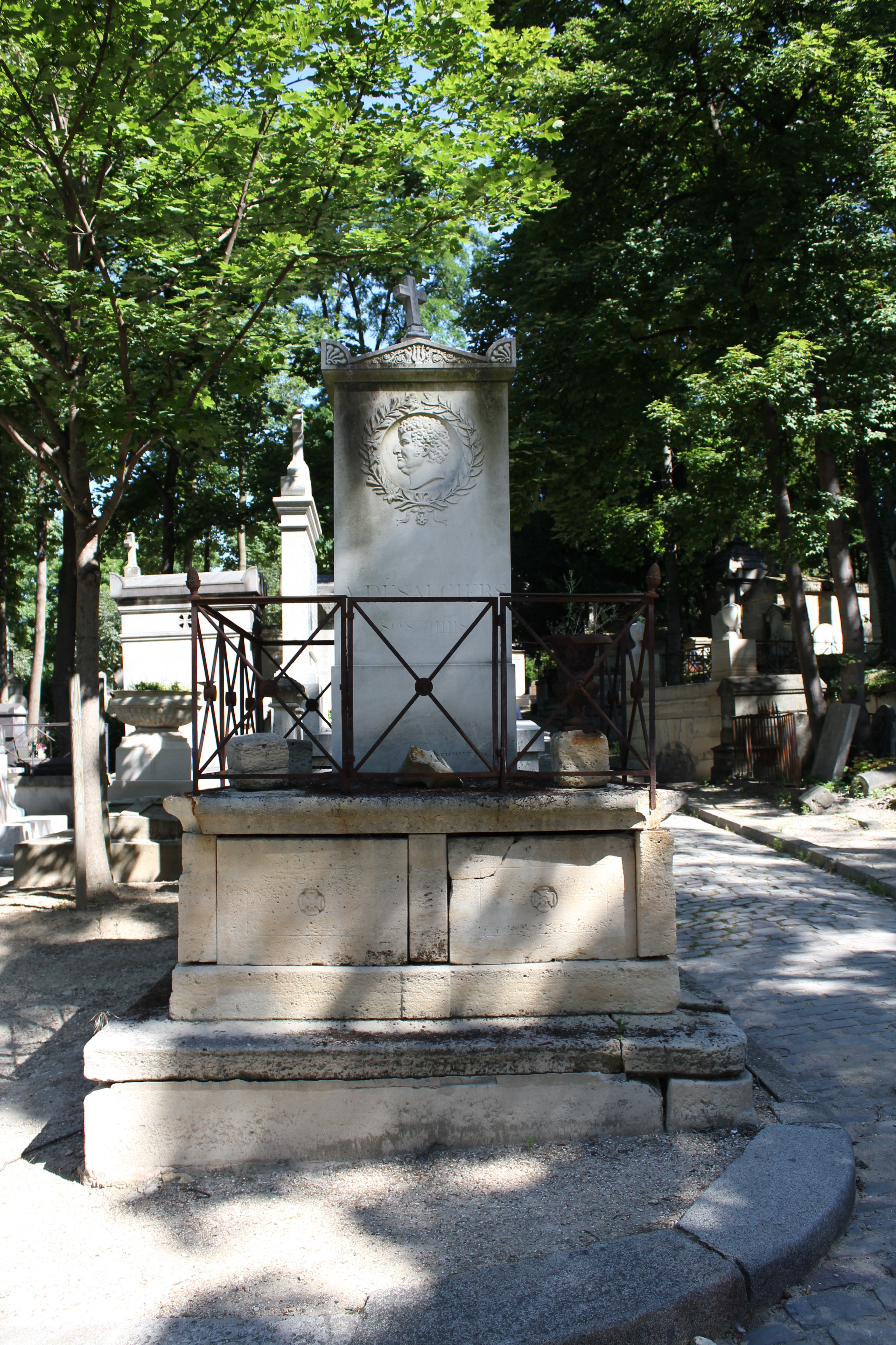 Sépulture de (1772-1827), chansonnier, poète, goguettier et vaudevillist. Tombe ornée d'un médaillon.